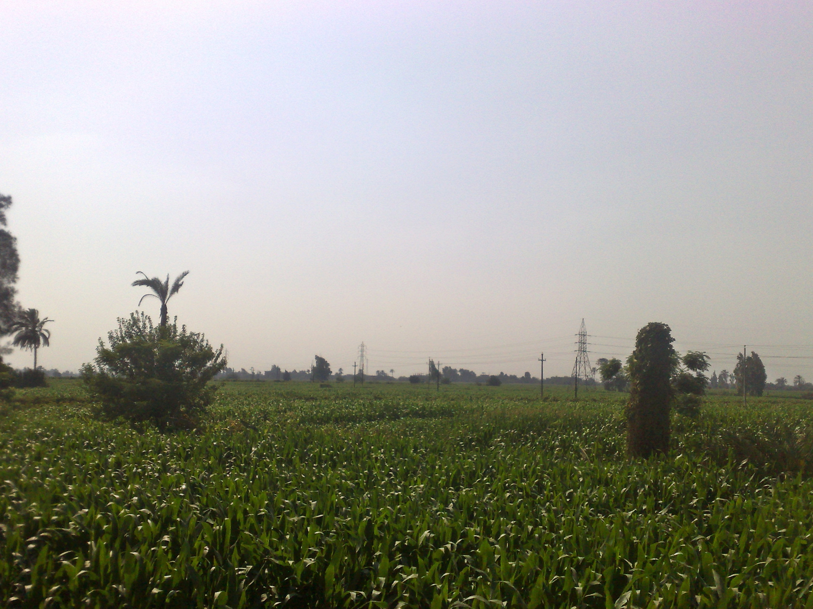 زمام قرية الحامل التابع لمركز منوف، مصر